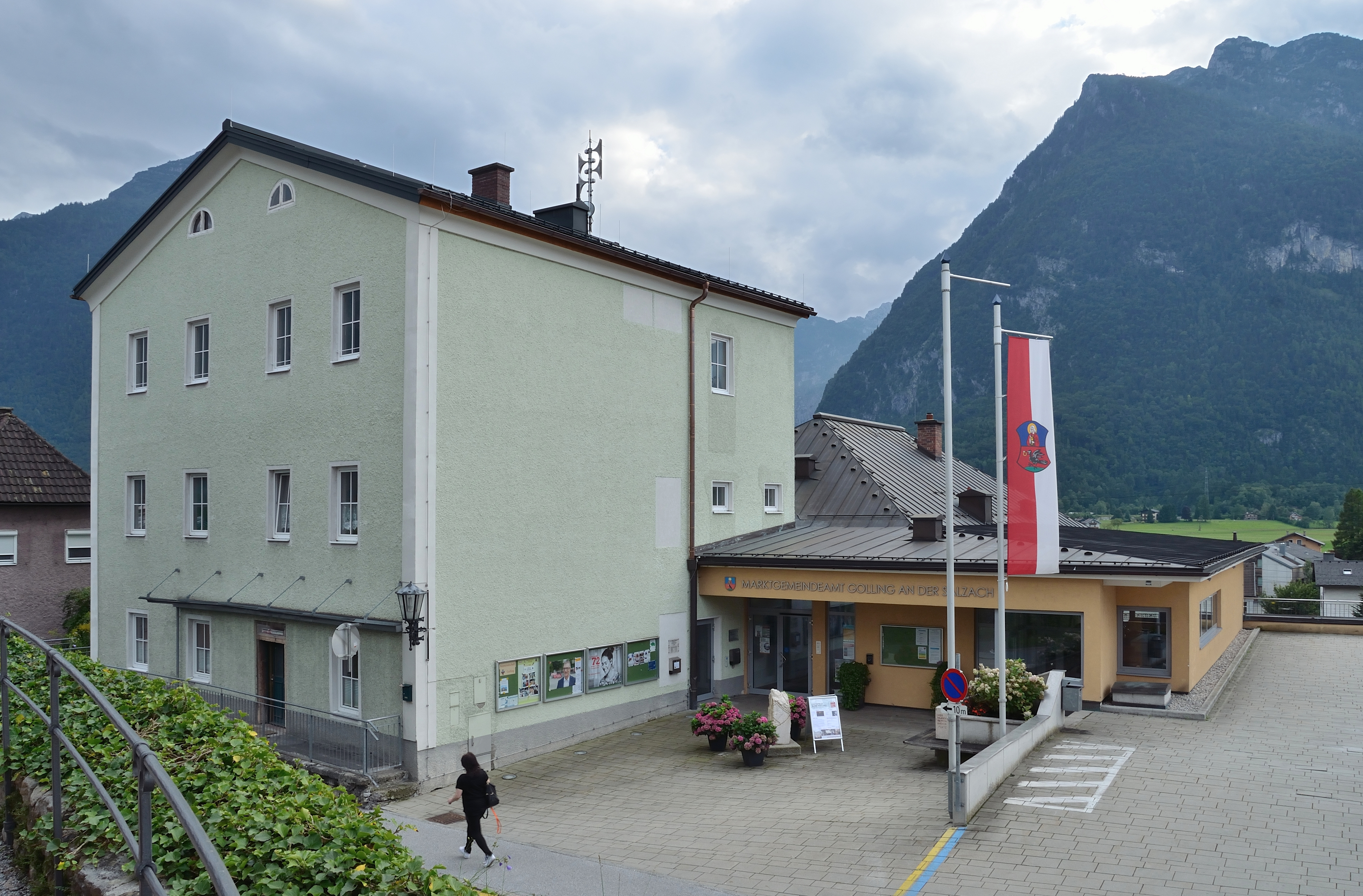 Das Marktgemeindeamt Golling an der Salzach von Aufgang zum Friedhof.